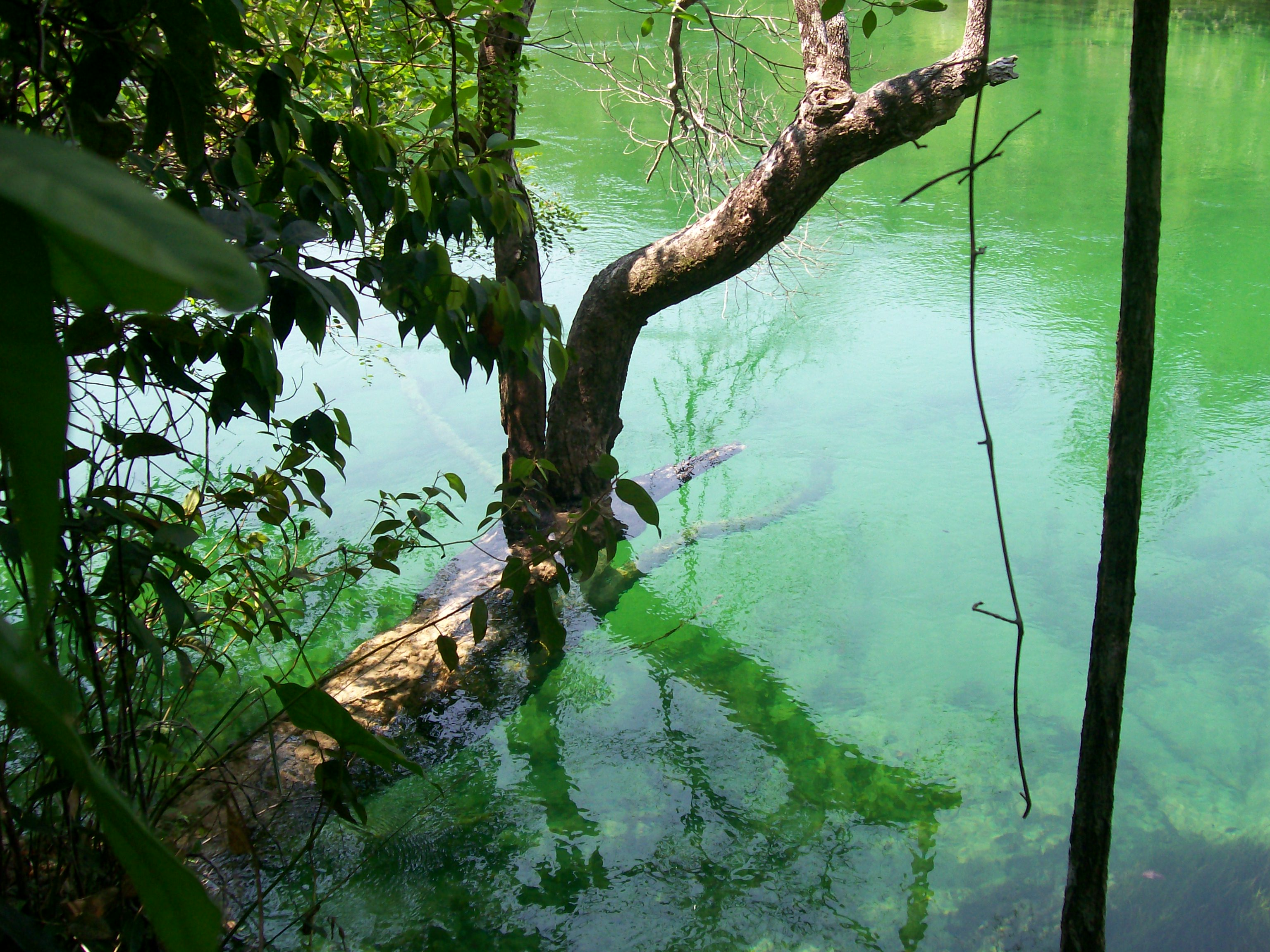 Águas Cristalinas